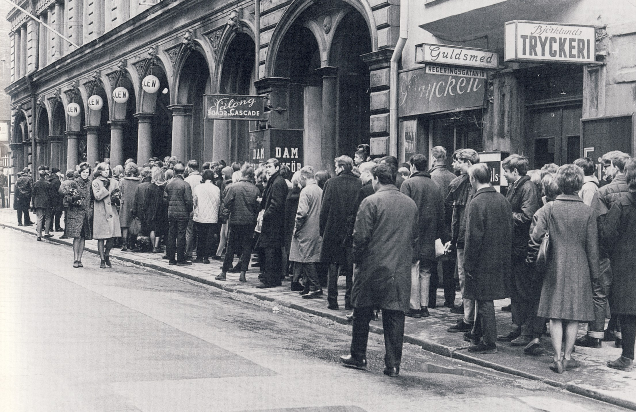 Nalenkö vid Regeringsgatan i Stockholm en torsdag i mars 1964